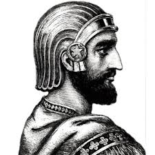 Ciro II